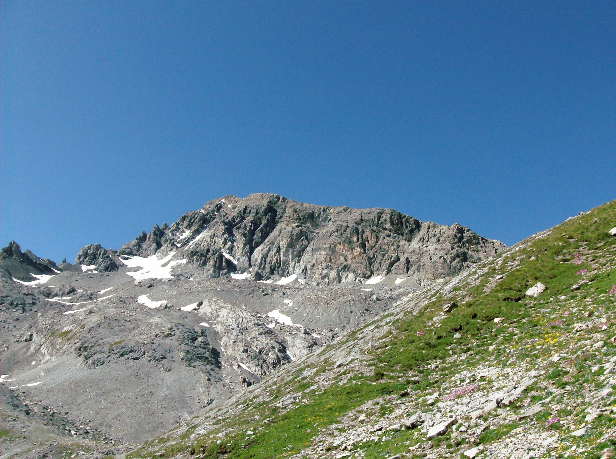 Il versante orientale del monte Sautron